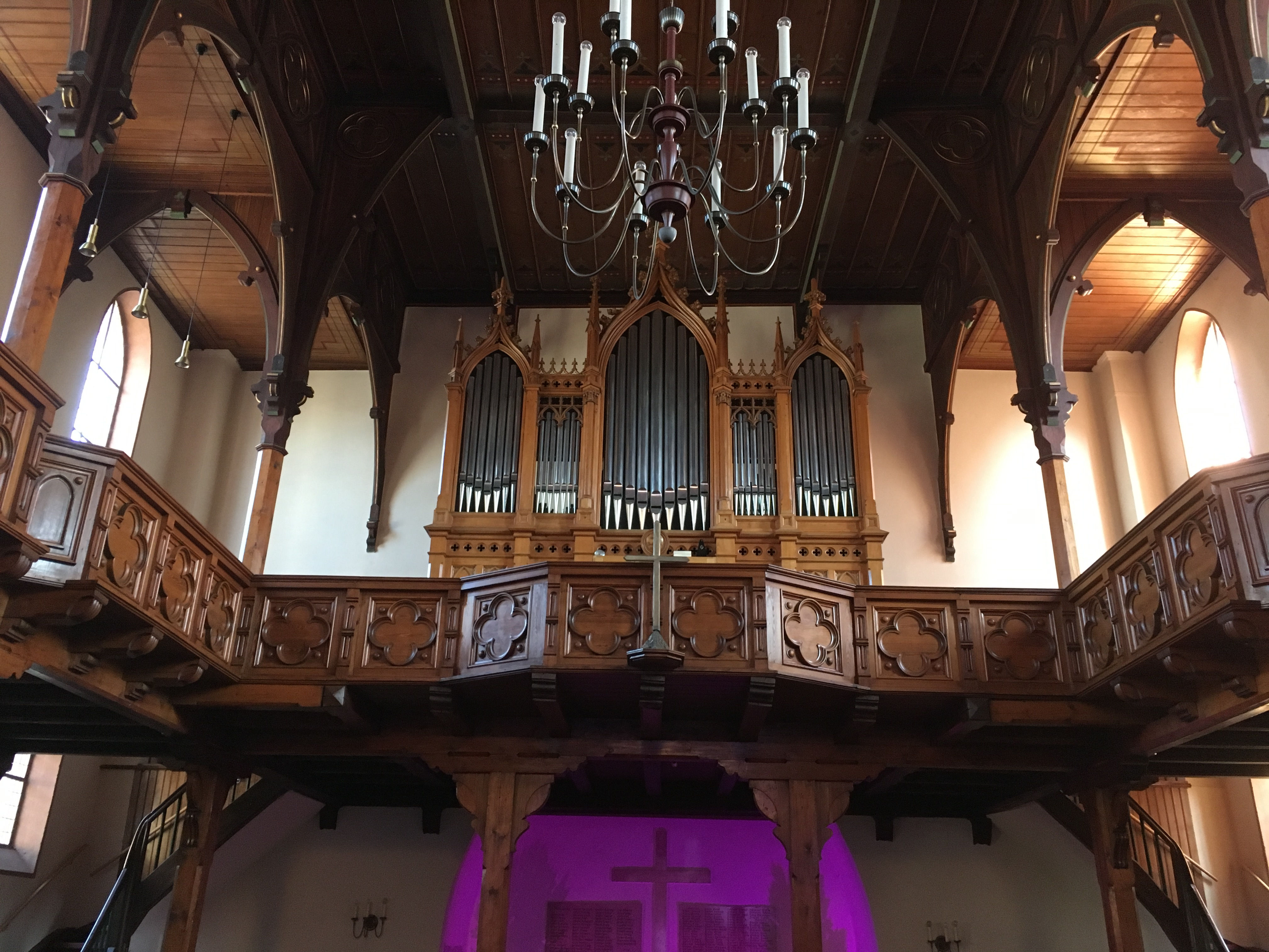 Orgel